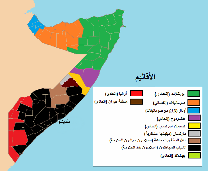 الوضع في الصومال،بتاريخ 23 يوليو سنة 2011.